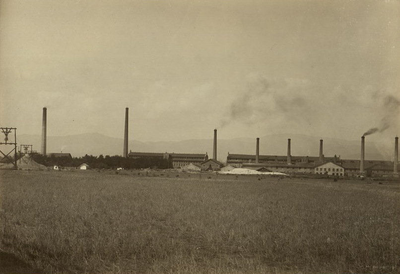 Българско акционерно индустриално дружество „Изида“ в Новоселци. Фотоалбум с фотографии на български индустриални предприятия от периода 1887-1912 г., подарен от Съюза на българските индустриалци на цар Фердинанд І по случай 25-годишнината от възшествието му на българския престол.